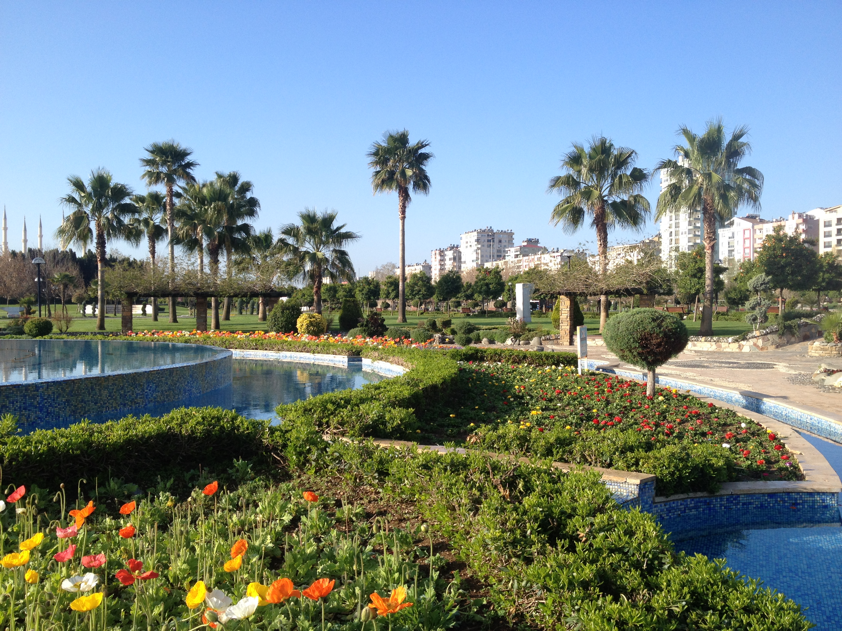 Adana, Reşatbey Mh., Seyhan/Adana, Turkey